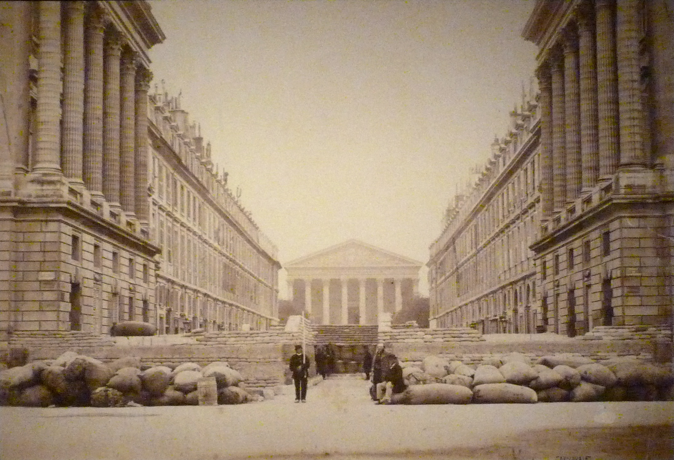 Exposition La Commune de Paris à l'Hôtel de Ville de Paris (18 mars - 28 mai 2011) - Barricade sur la rue Royale, au bord de la place de la Concorde - Photo d'Auguste-Hippolyte Collard, musée Carnavalet